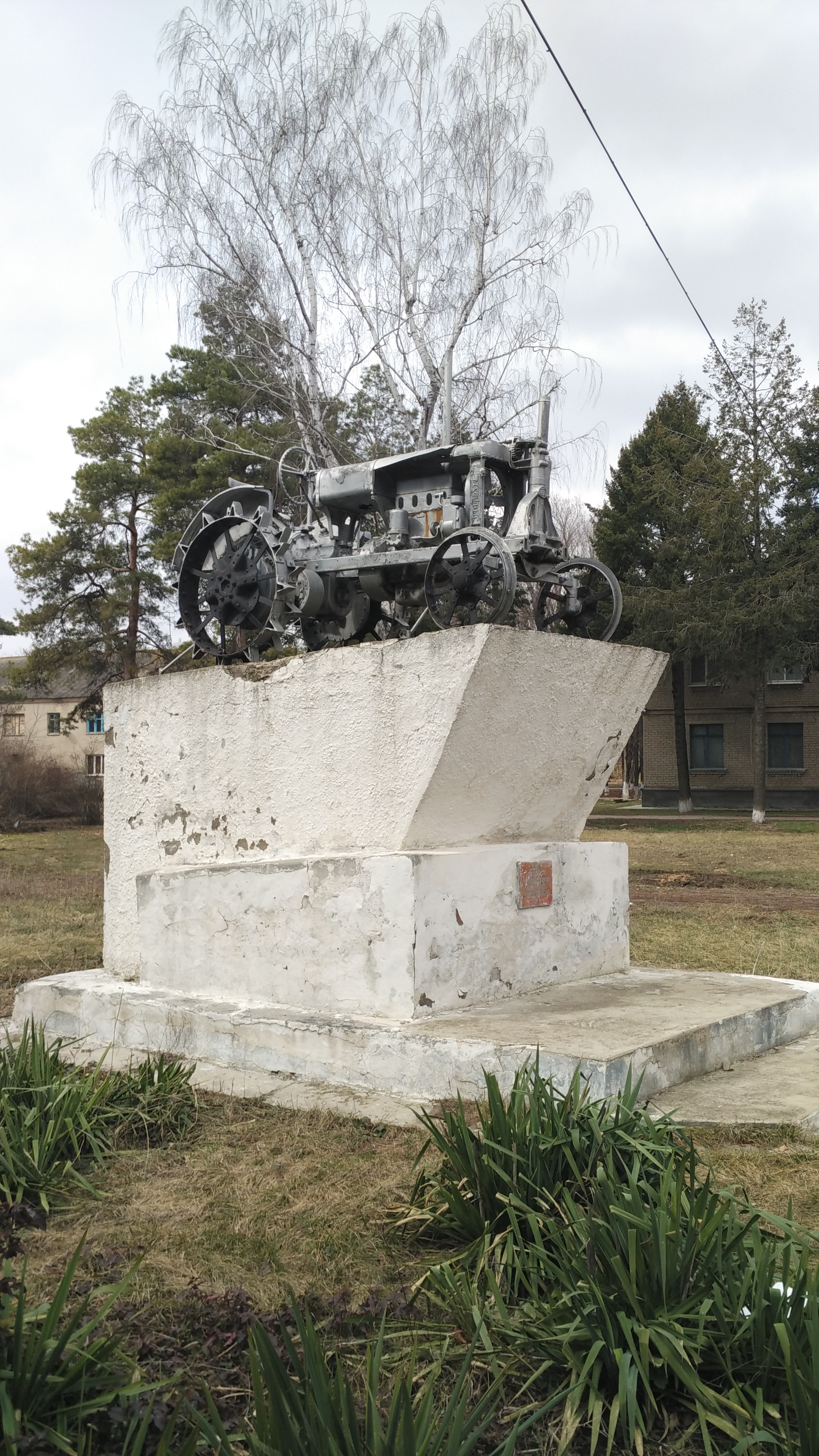 трактор "универсал", установленный в честь трудовой славы земледельцев: у здания конторы, зерносовхоз "кущевский", Кущёвский район, Краснодарский край